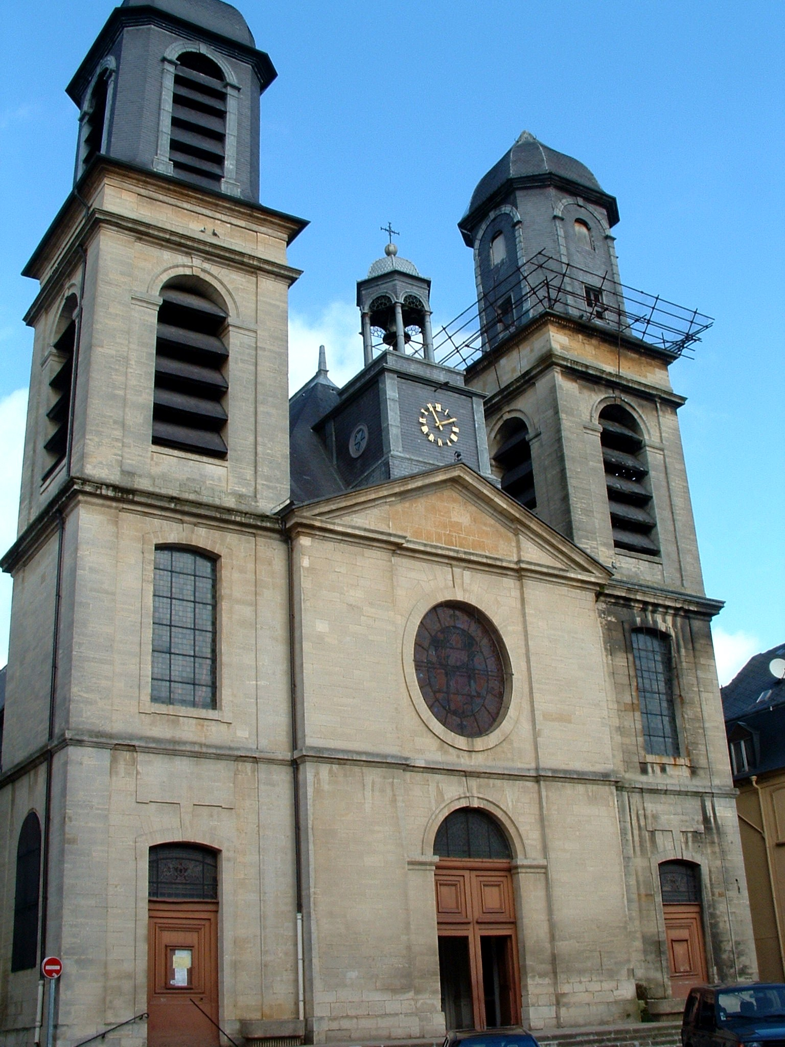 Sedan - Eglise Saint-Charles-Borromée - Façade